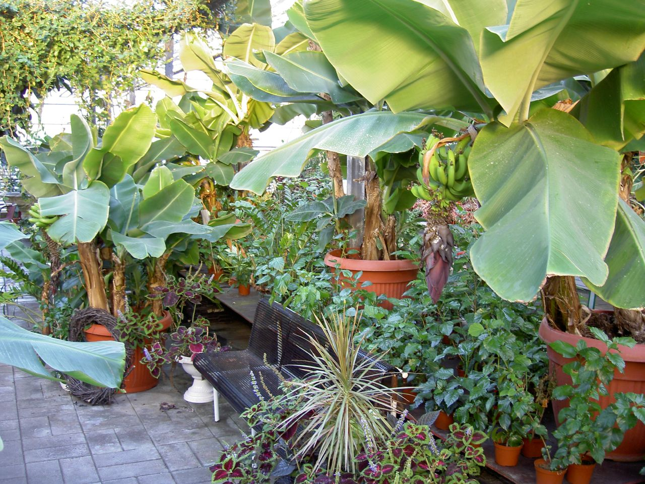 icelandic bananas